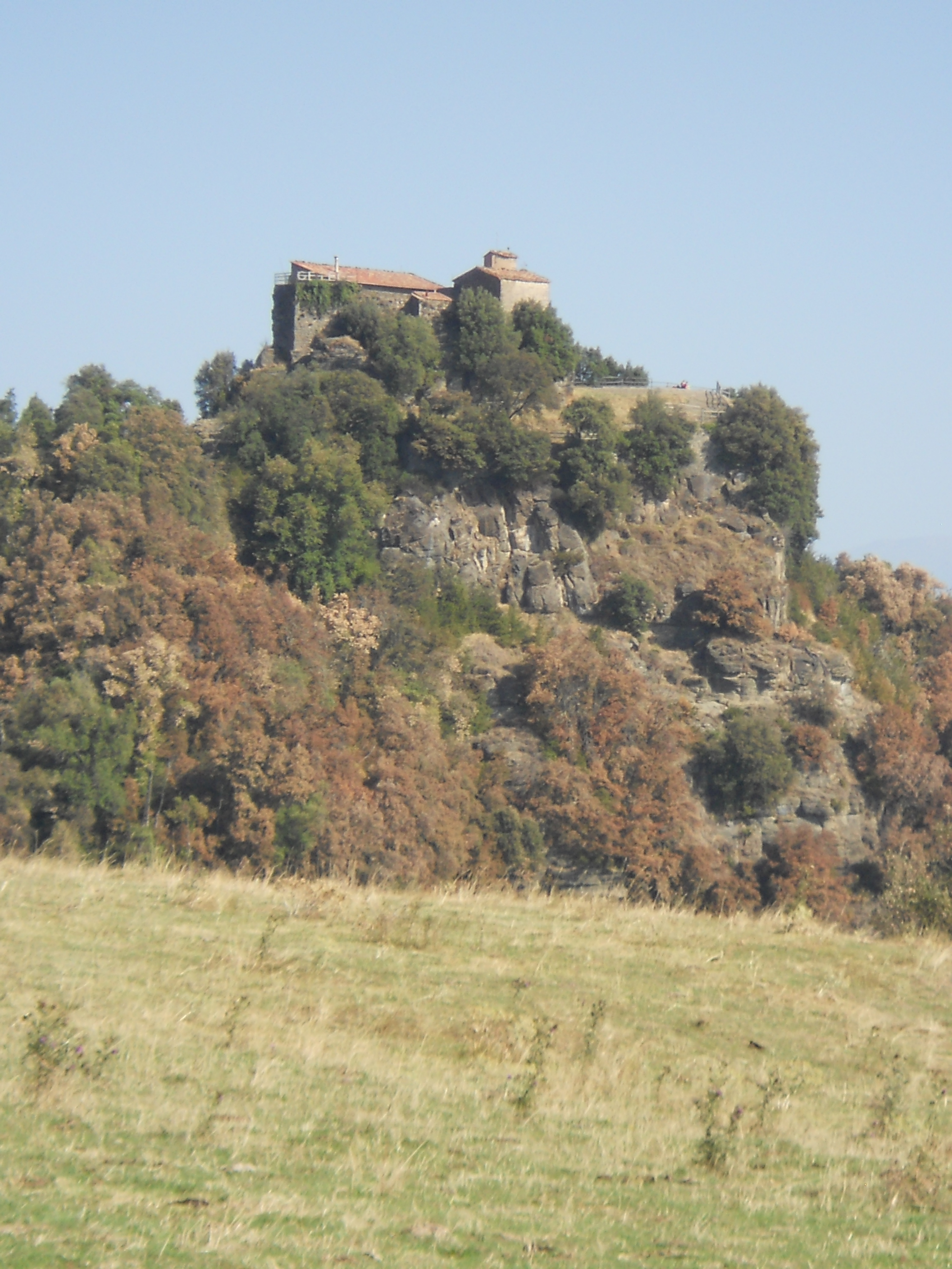 Entorn del Castell de Castelló d'en Bas, a l'actual municipi de la Vall d'en Bas a la Garrotxa.